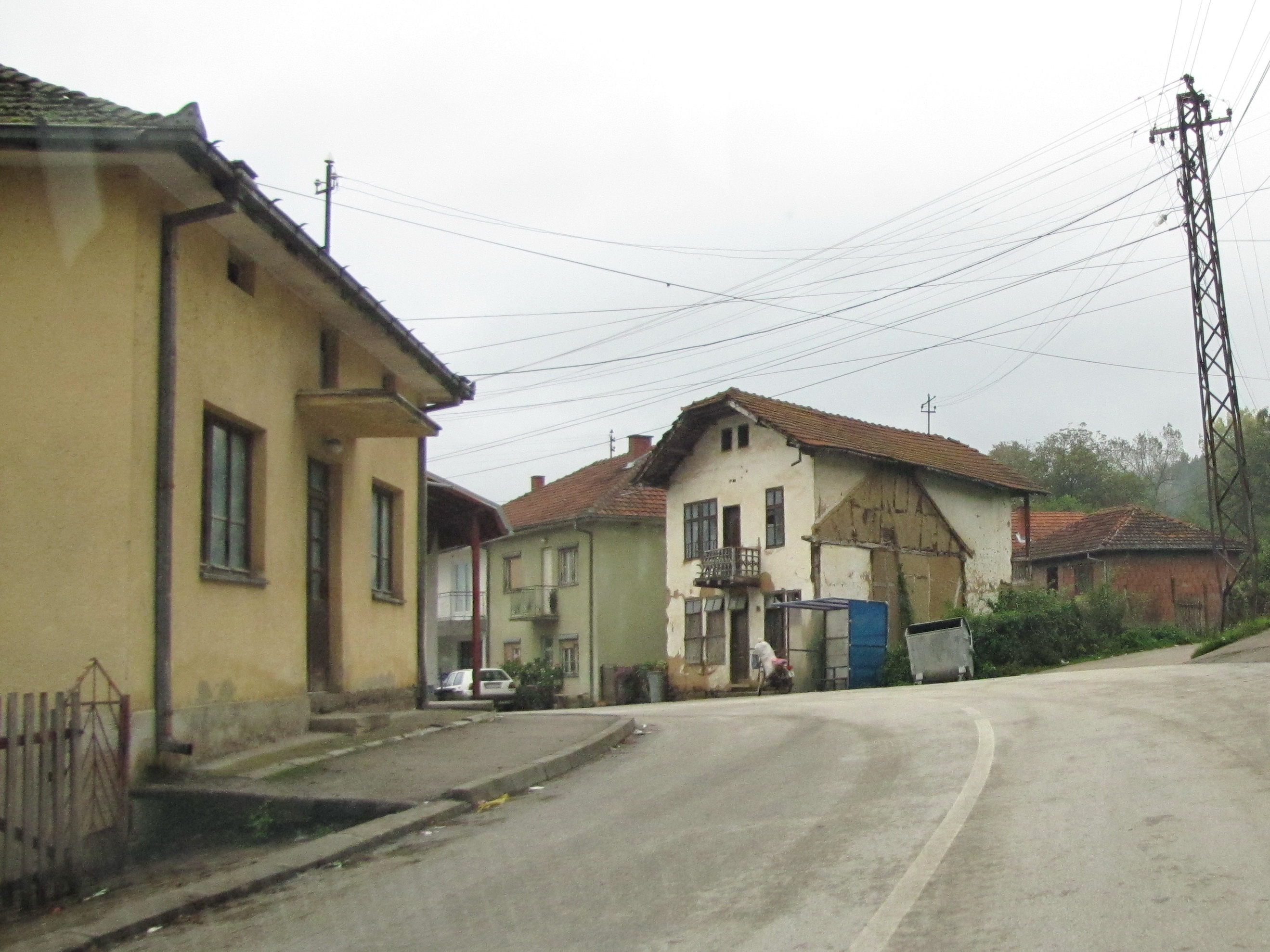 Село Рајчиловци (Босилеград).